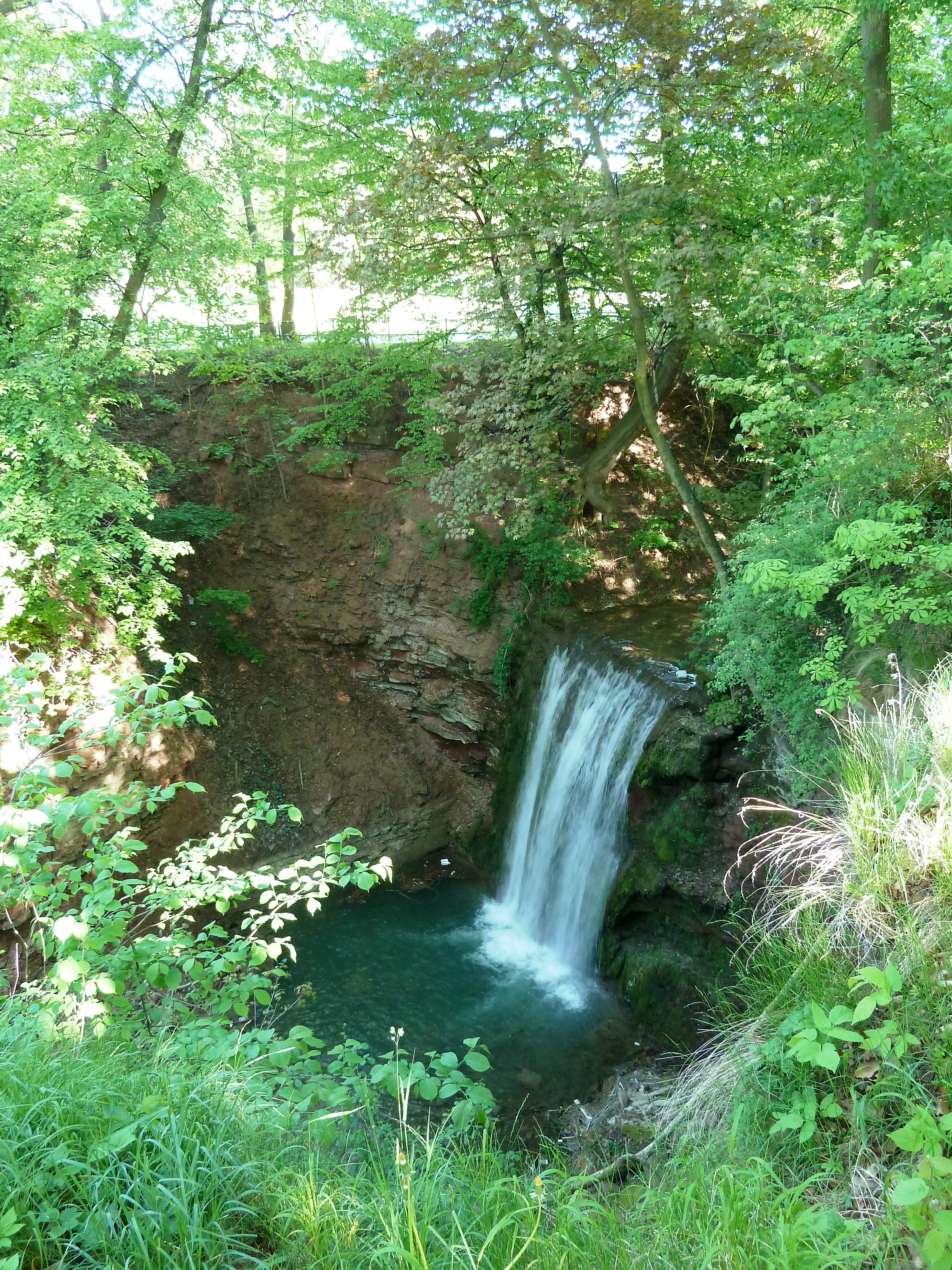 Wasserfall der Geislede an der Scheuche in Heiligenstadt, Landkreis Eichsfeld, Thüringen